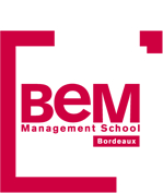 logo BEM